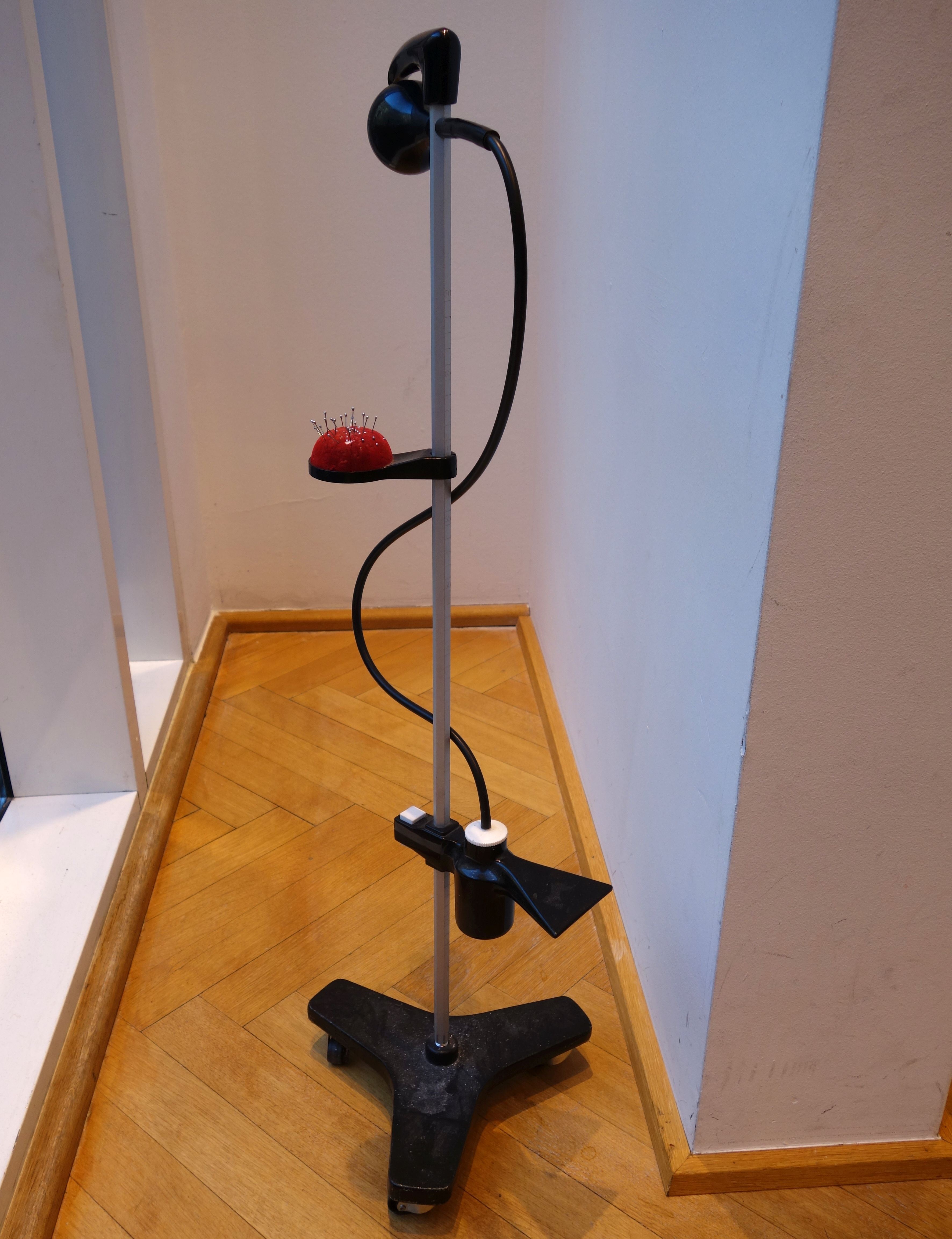 Rockabrunder. Gesehen bei Anson's, Düsseldorf, Schadow-Arkaden. Rockabrunder, 2018.jpg (a)